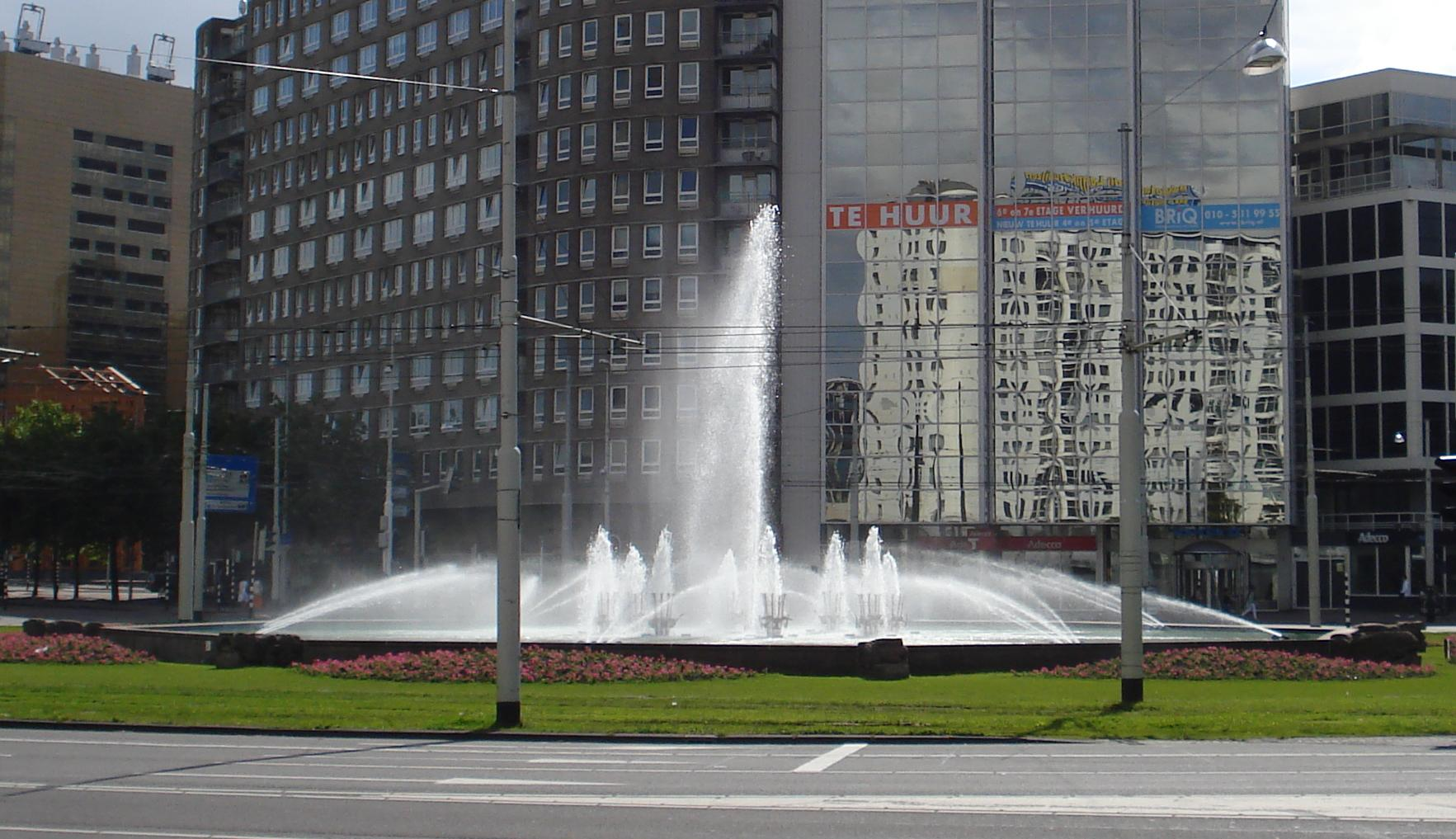 Rotterdam. Hofplein. Verkeersrotonde en fontein.